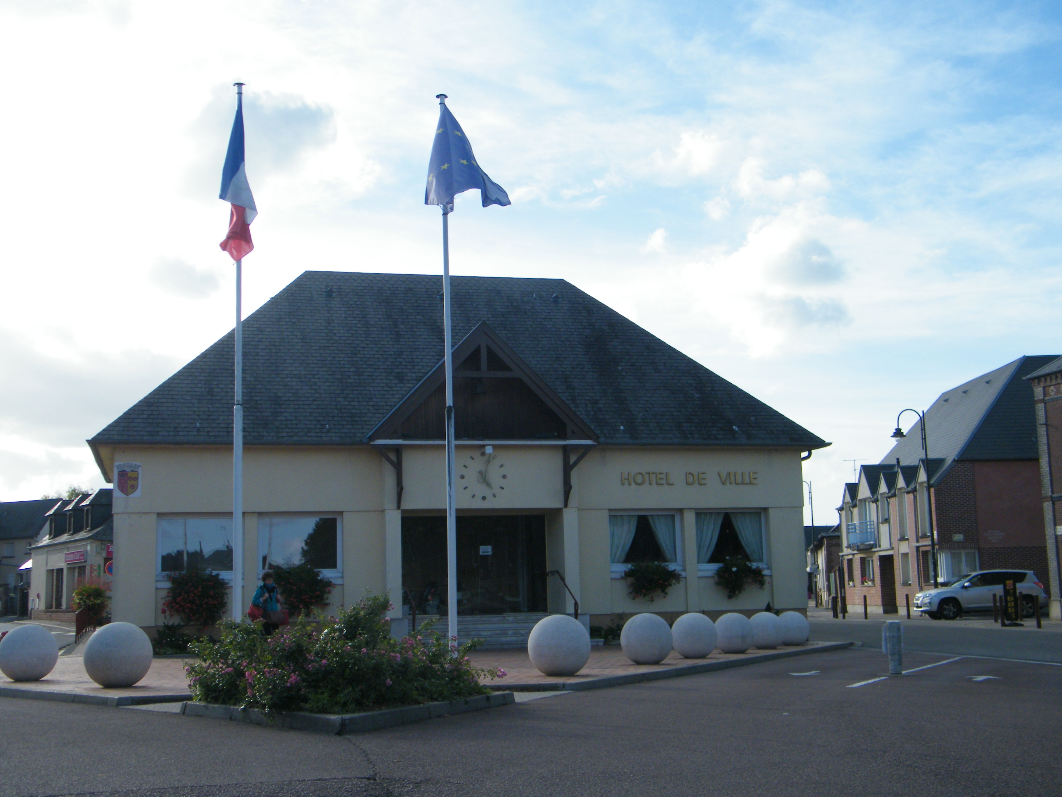 Feuquières, Somme, Fr, mairie